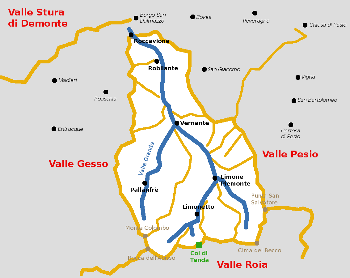 Schema morfologico generale della valle Vermenagna. In arancione gli spartiacque e le creste principali; in blu le aste principali di fondovalle